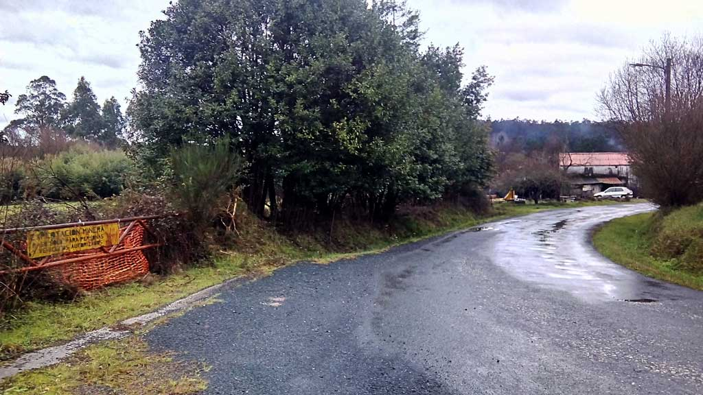 Vista da Gándara, Pedroso, Narón.